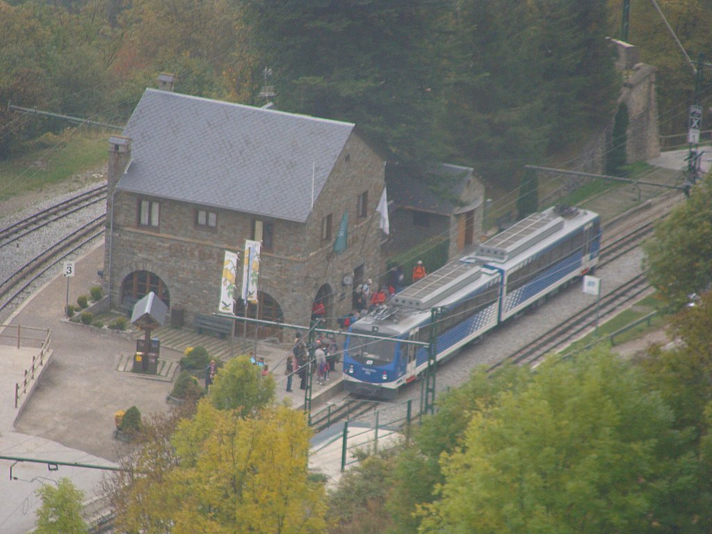 El Balandrau fa parada a l'estació de Queralbs per enfilar cap a Núria. Recordo que aquell dia ens va fer un temps molt plujós i amb boira, una llàstima per les fotos. El Balandrau hace parada en la estación de Queralbs para luego ascender hacia Núria. Recuerdo que aquel día nos hico un tiempo muy lluvioso y con niebla, una lástima por las fotos.